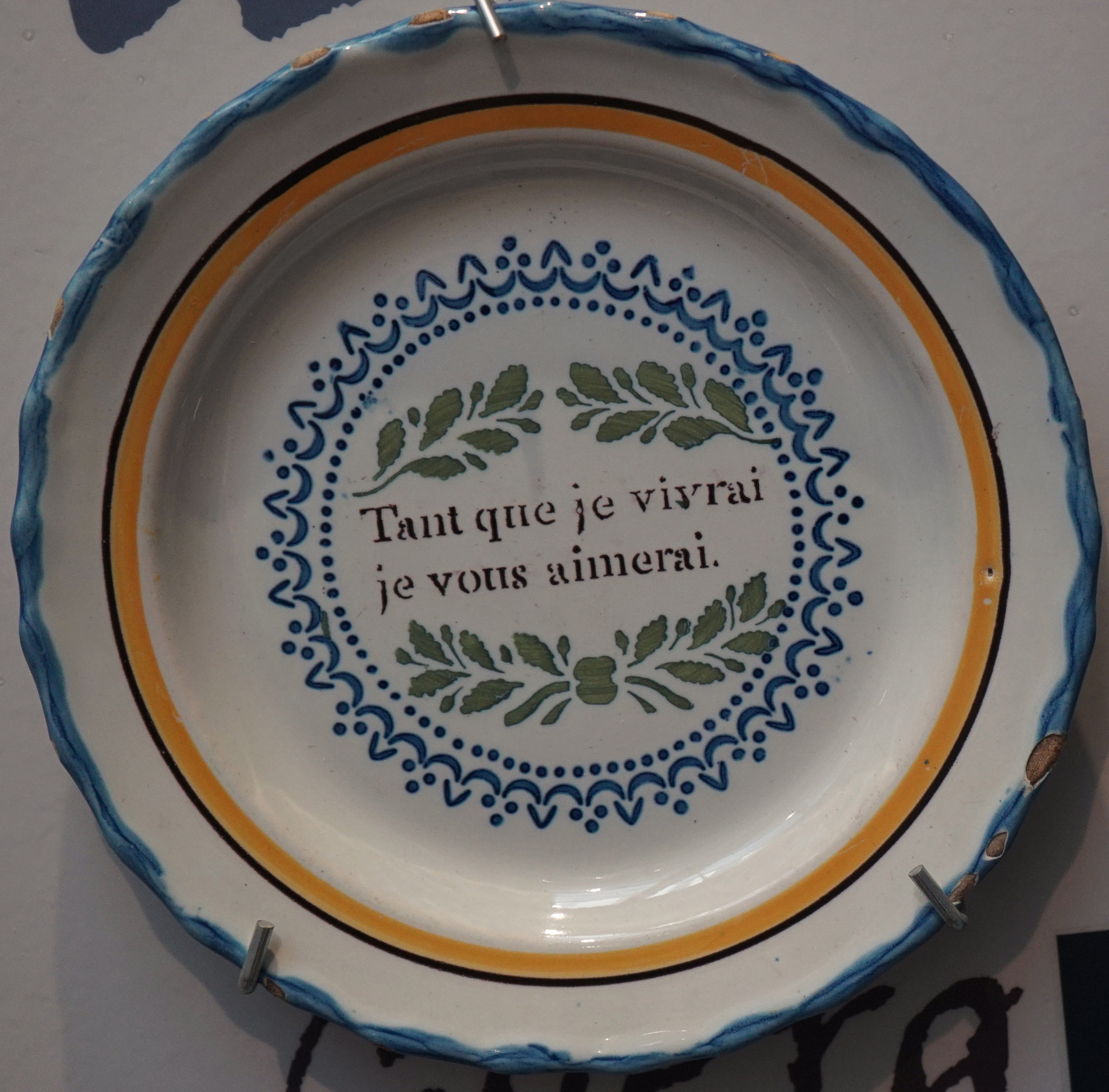 lors d'une exposition temporaire.